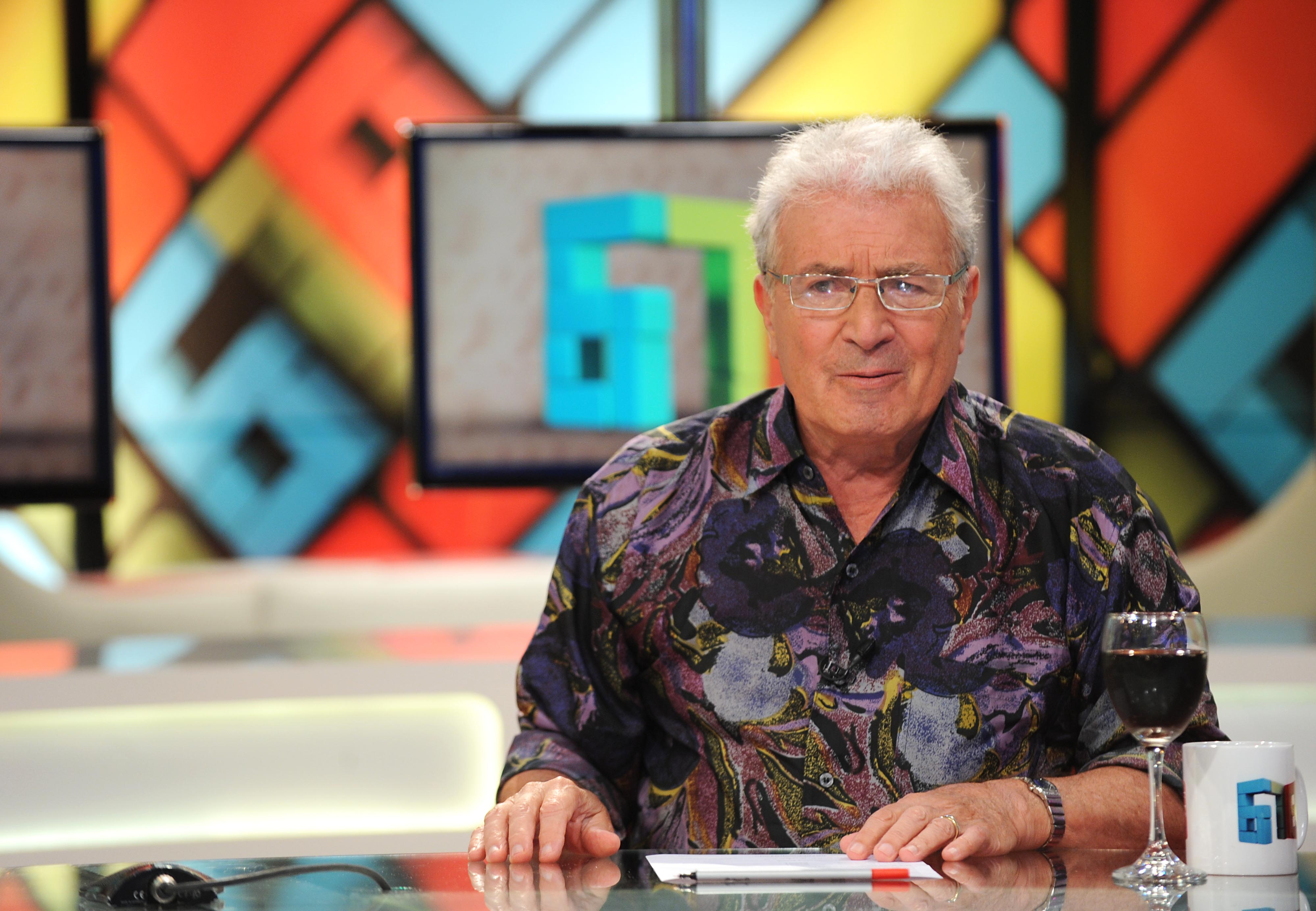 Orlando Barone en 678.